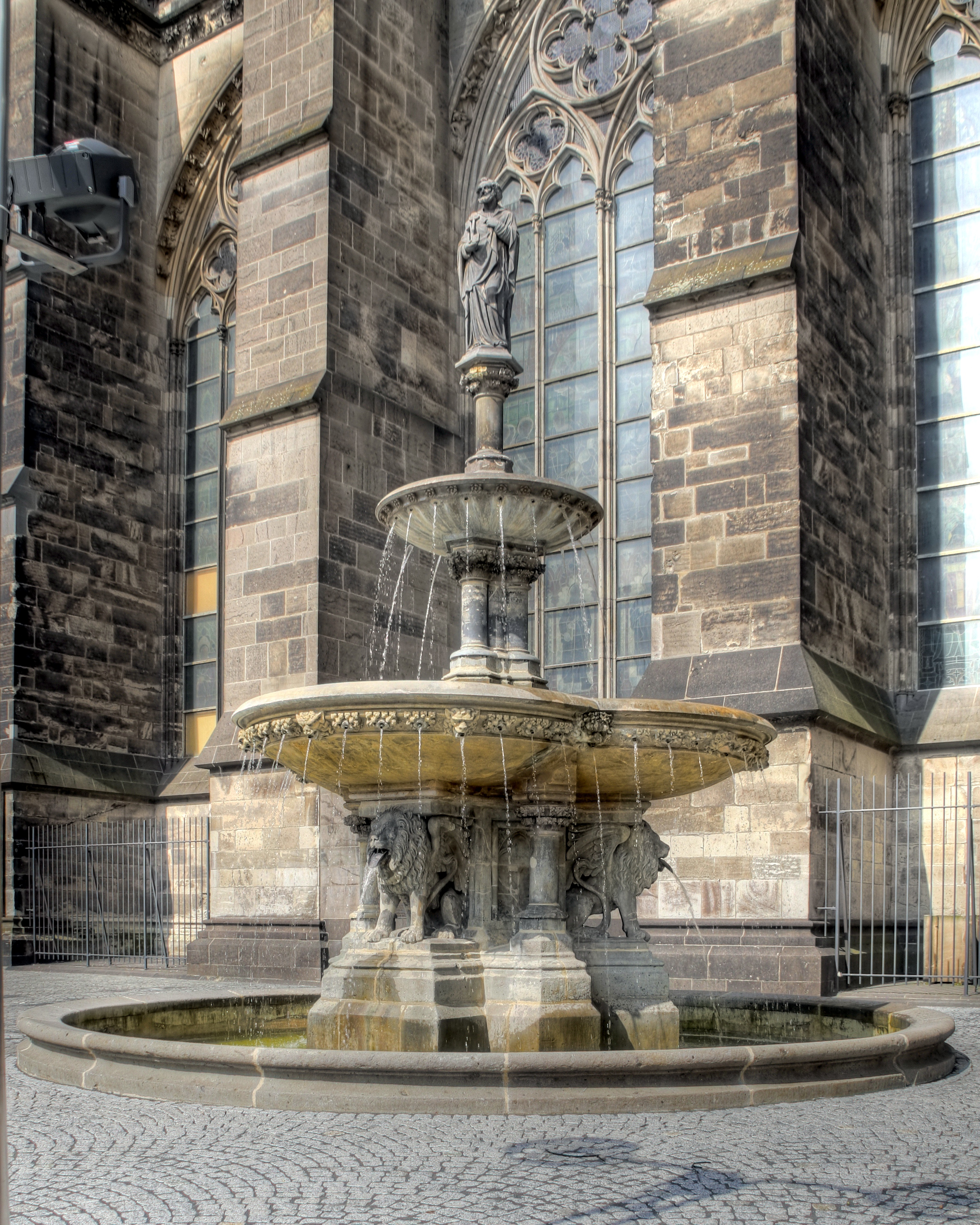 Petrusbrunnen auf der Papstterrasse an der Südseite des Kölner Domes. Bildhauer: Dombaumeister Richard Voigtel und Dombildhauer Peter Fuchs, fertiggestellt 1870. Der Stadt Köln gestiftet durch Kaiserin Augusta (die Gattin Wilhelms I.). Neu errichtet Juli 2010.